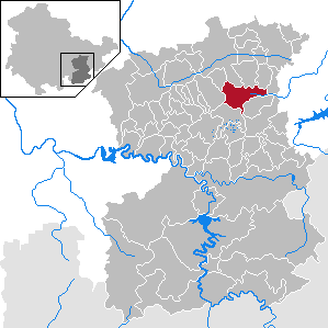 Linda b. Neustadt an der Orla in Thuringia - Saale-Orla-Kreis